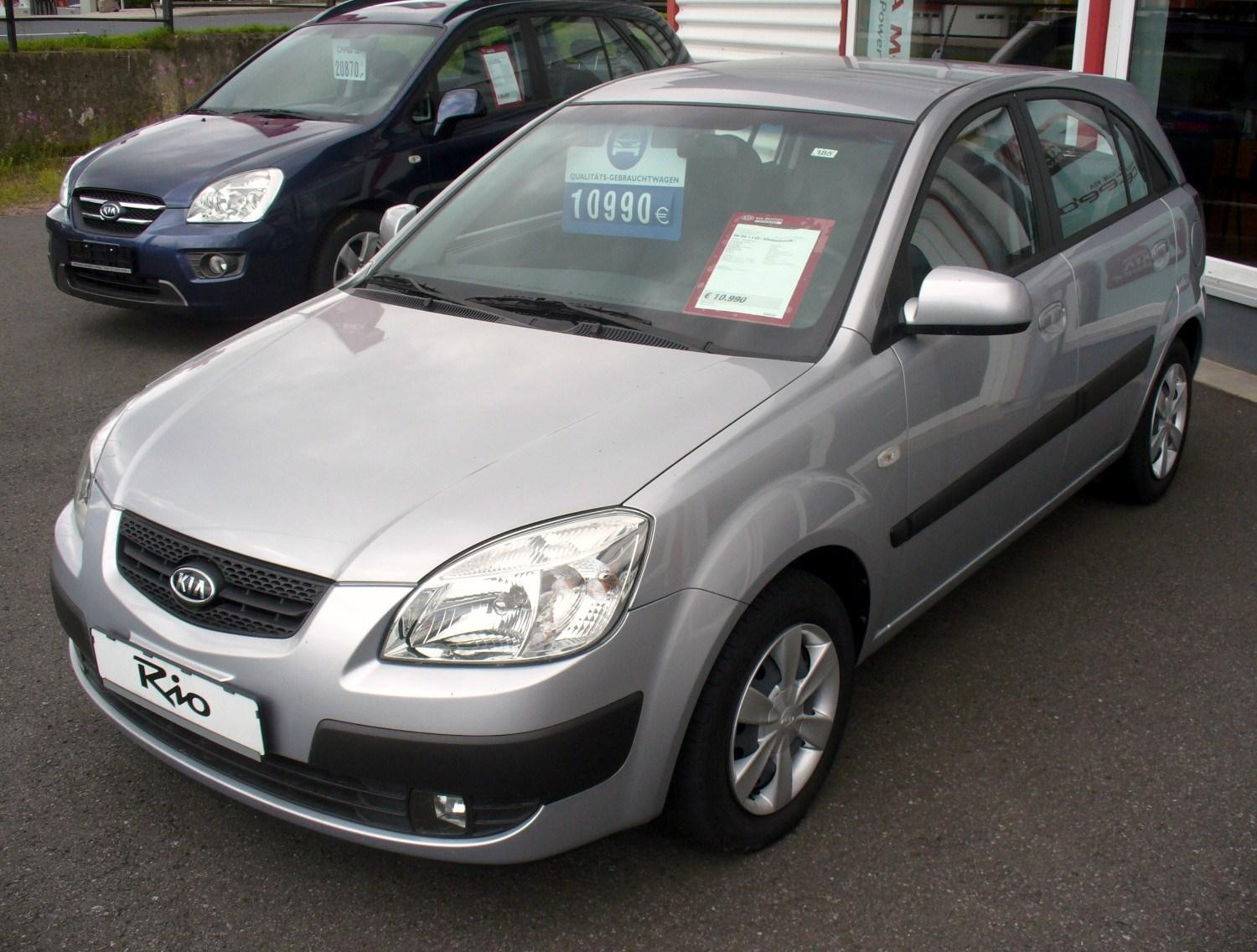 Kia Rio